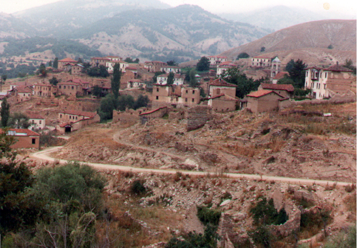 Селото Ошчима, егејска Македонија.